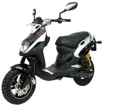 l'original